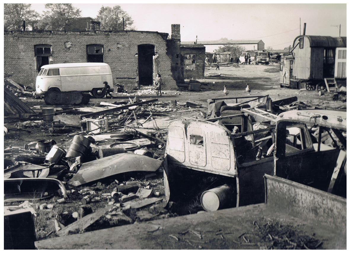 Unterkunft für Sinti und Roma, Preetzer Straße - Kiel